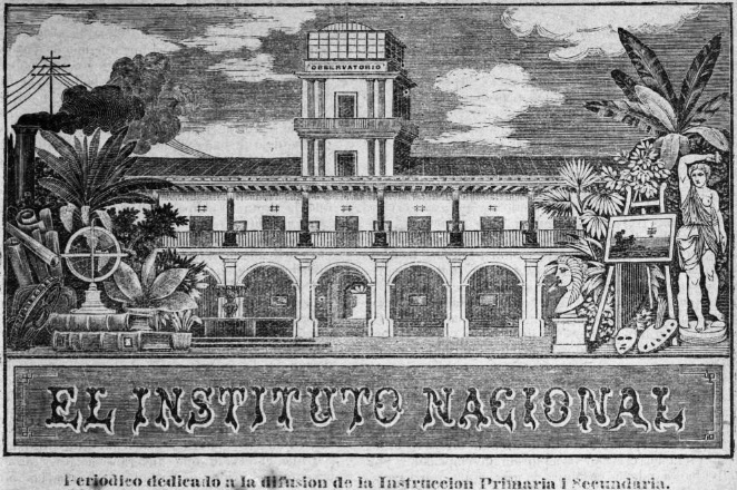 Logo del periódico El Instituto Nacional, del Instituto Central para Varones de Guatemala